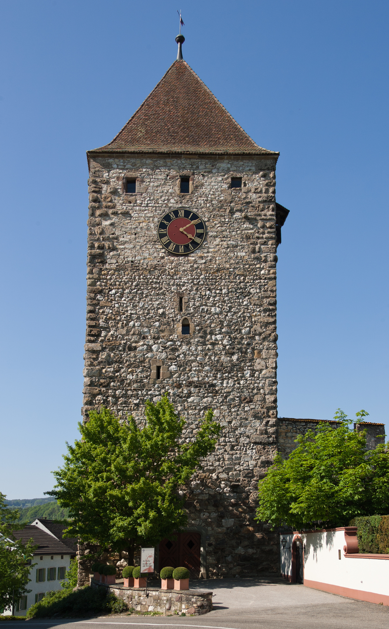 Oberer Turm in Kaiserstuhl